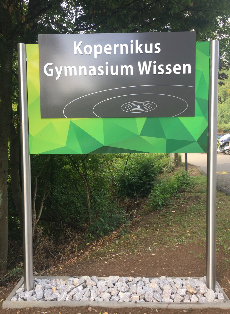 Tafel am Eingang des Kopernikus-Gymnasiums mit dem Schriftzug der Schule an der oberen Auffahrt des Parkplatzes